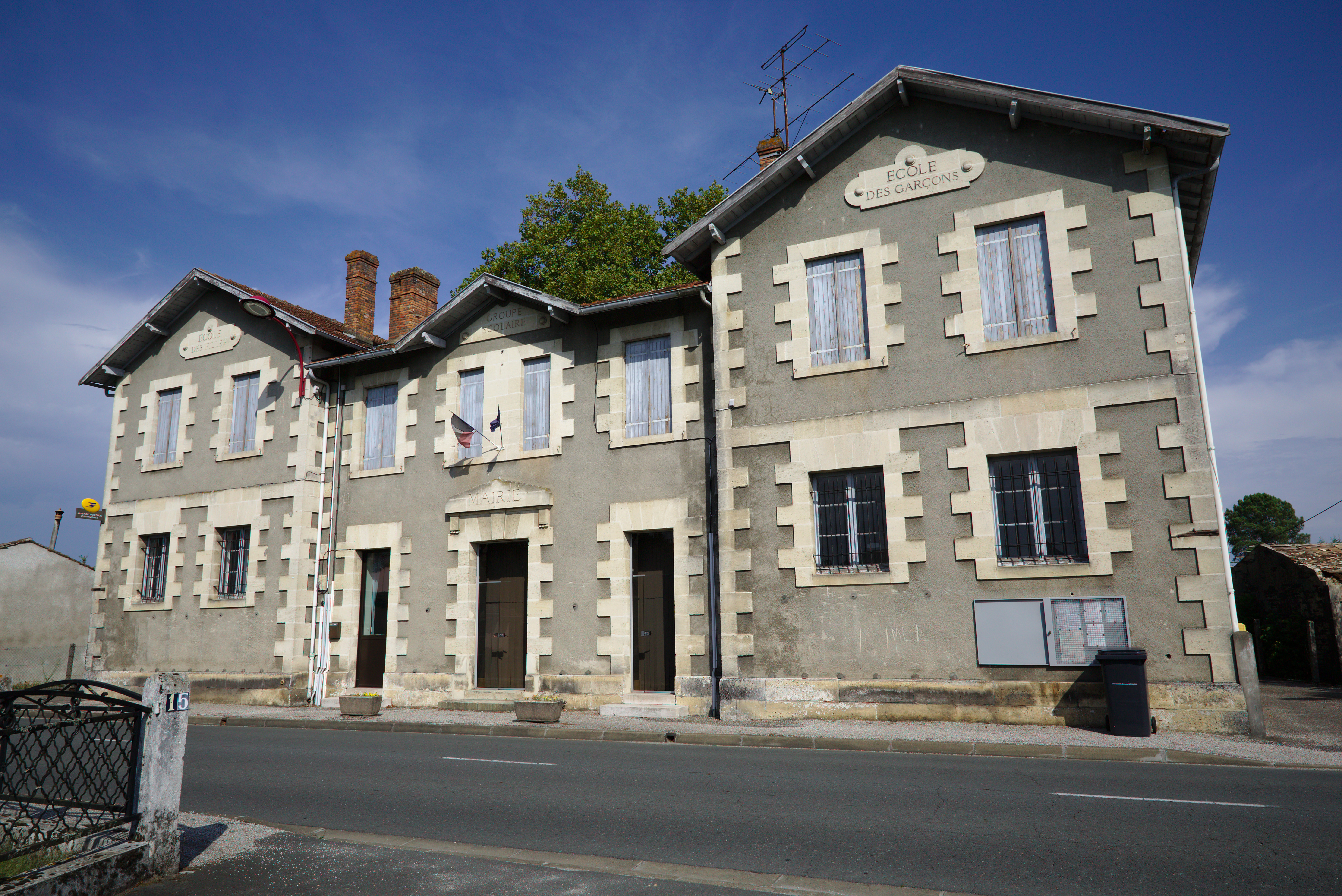 Mairie et écoles du Temple